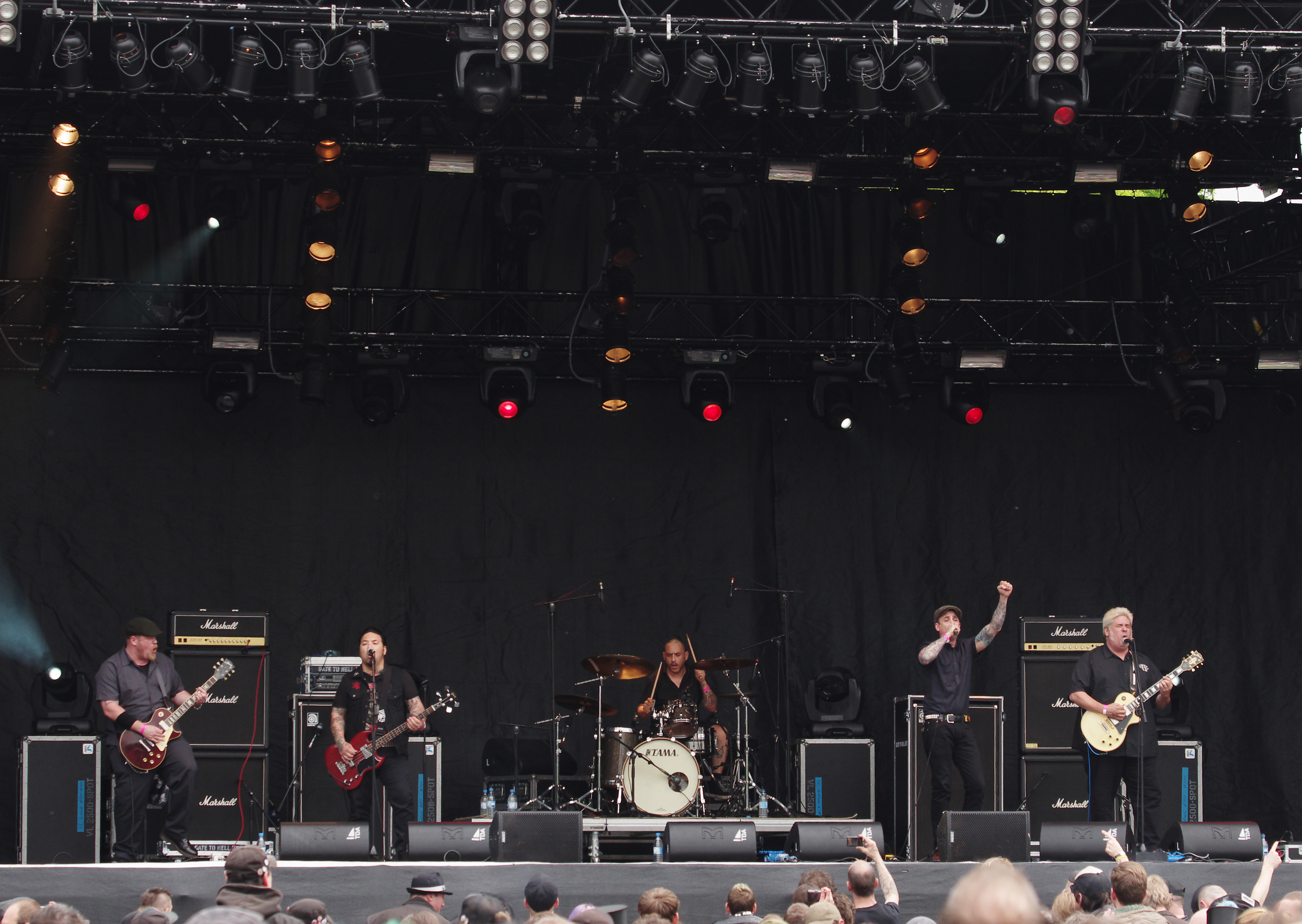 The Generators, Punkrockband aus Los Angeles, Auftritt beim Ruhrpott Rodeo 2013 in Hünxe.